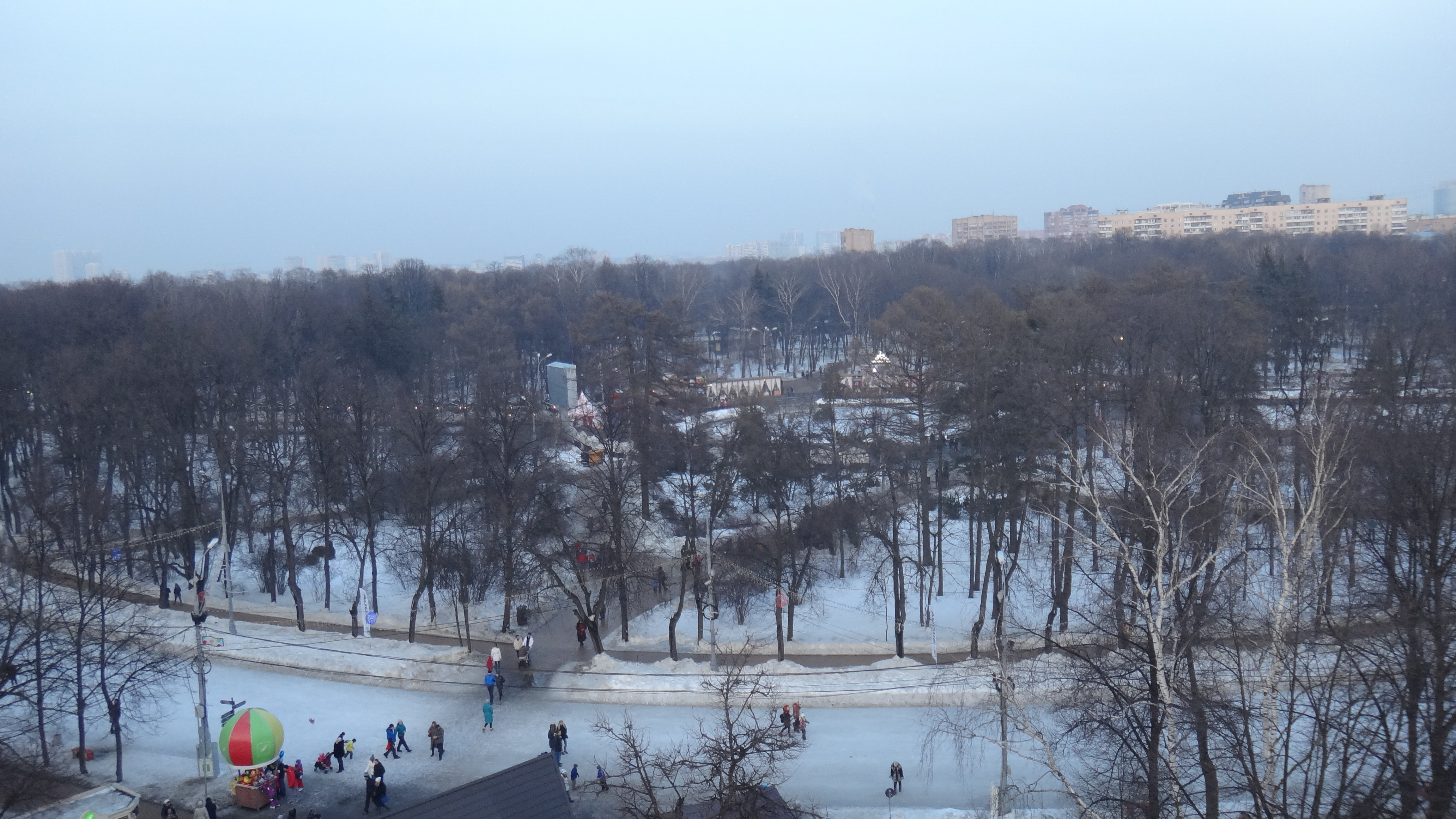 Sokolniki District, Moscow, Russia